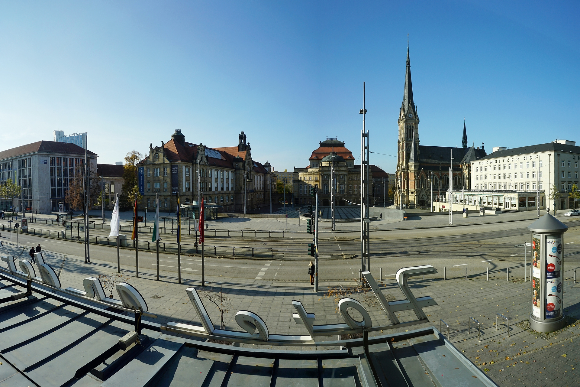 Der Theaterplatz in Chemnitz mit Kunstsammlungen, Opernhaus, St. Petrikirche und Hotel "Chemnitzer Hof"